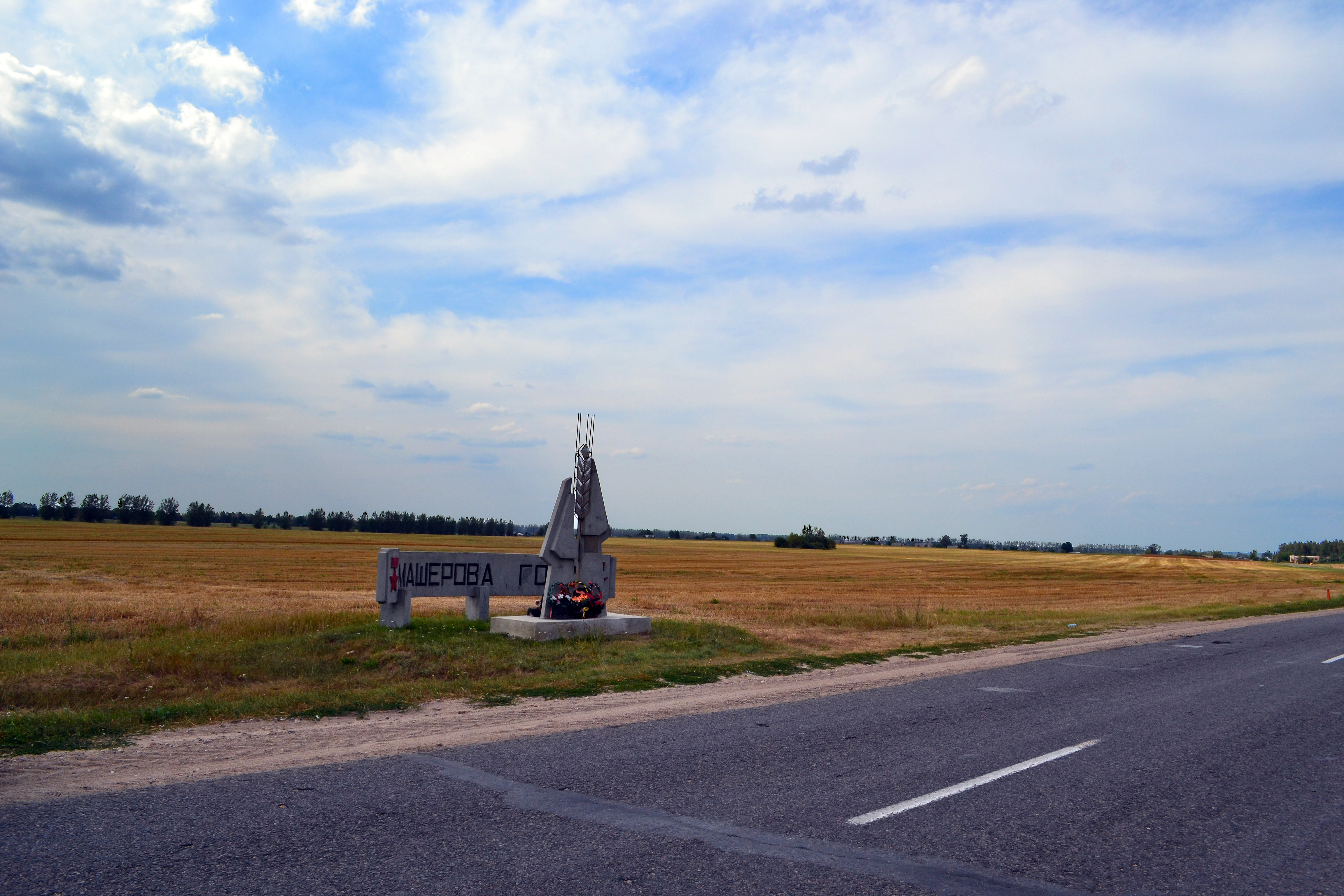 Беларуская (тарашкевіца): Мэмарыяльны знак «Гара Машэрава» пры адцінку дарогі Лукомер — Малеч (Бярозаўскі раён).